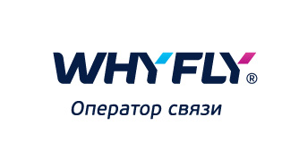 виртуальный оператор сотовой связи